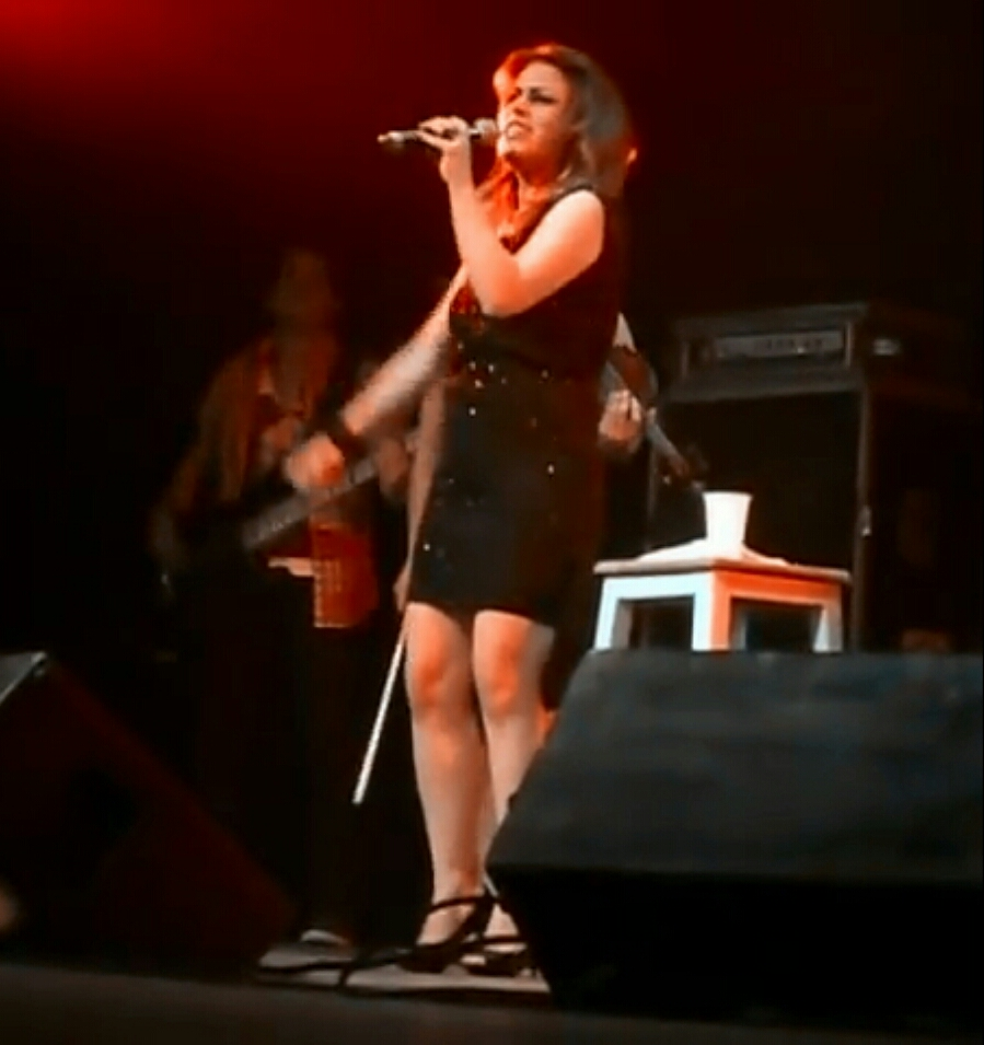 Lu na turnê O Amor e o Tempo